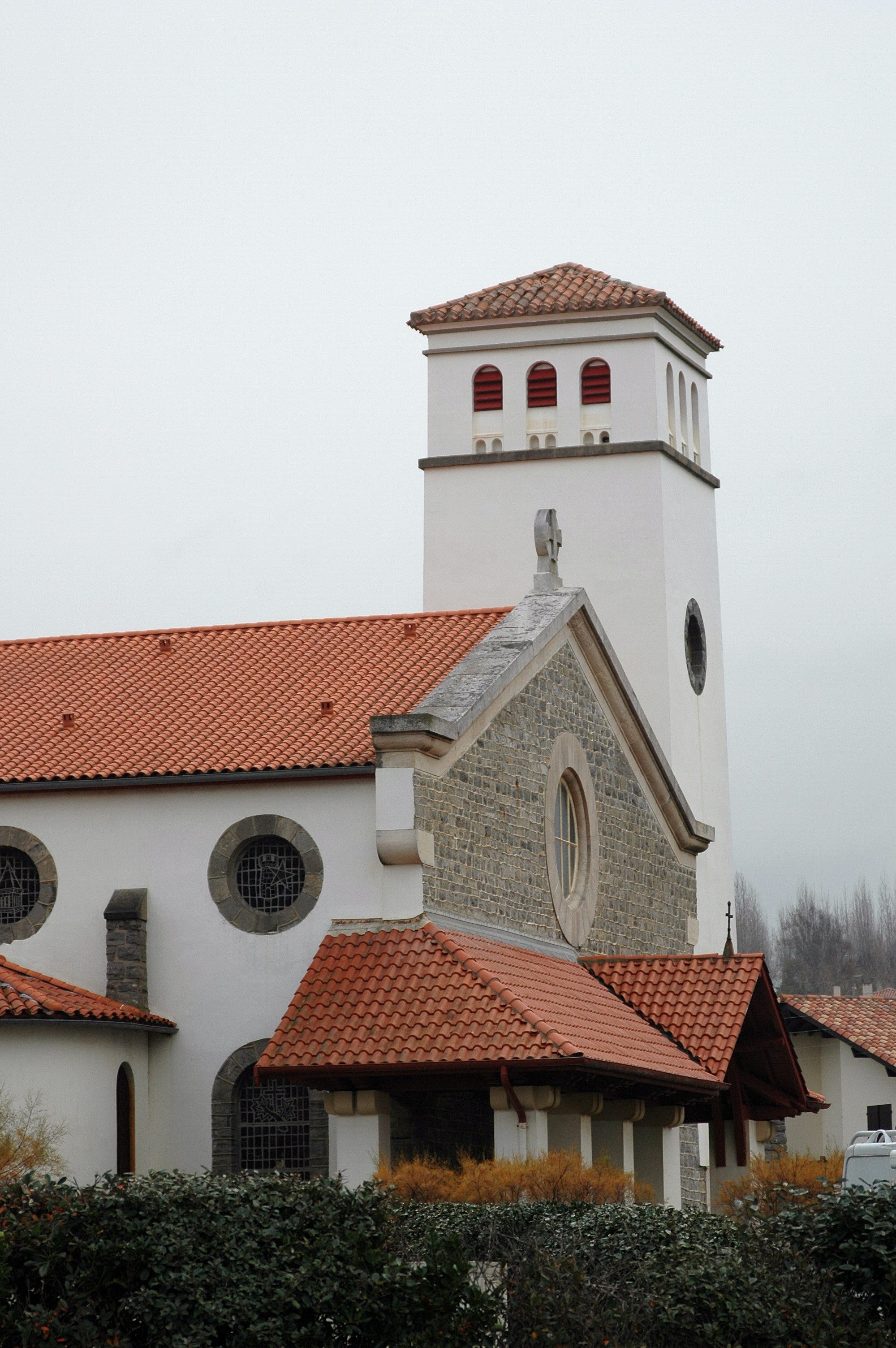 Hendaye plage, l'église Sainte-Anne. Photo prise le 06/01/07 par Harrieta171